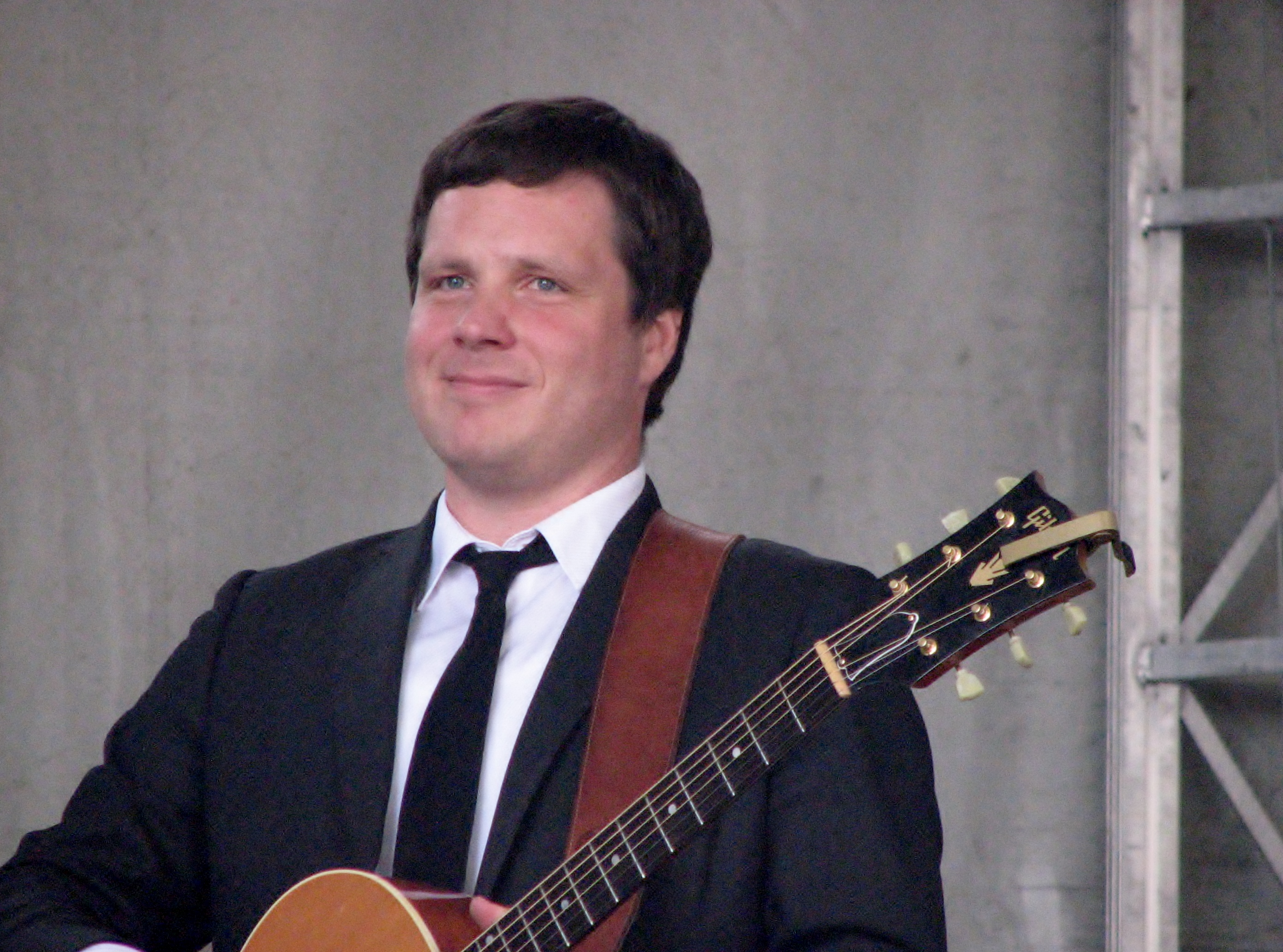 Koit Kelder ansambli "Onud" koosseisus esinemas Vaba Rahva Laulul Kuressaare lossihoovis